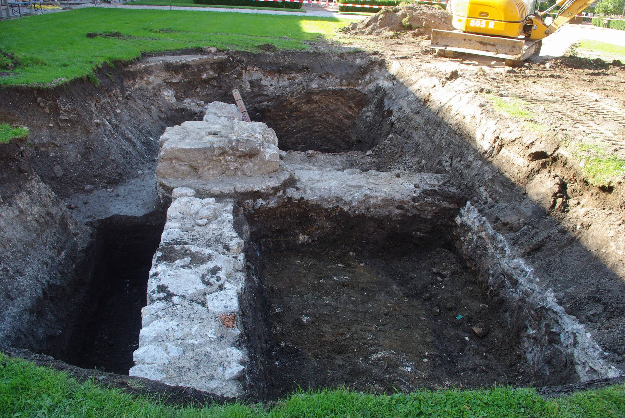 Alte Saline in Bad Reichenhall, Ausgrabung im mittleren Innenhof im September 2018, Fundament eines Vorgängerbaus, vermutlich aus dem 16. Jahrhundert vor oder nach dem Stadtbrand von 1515This is a photograph of an architectural monument.